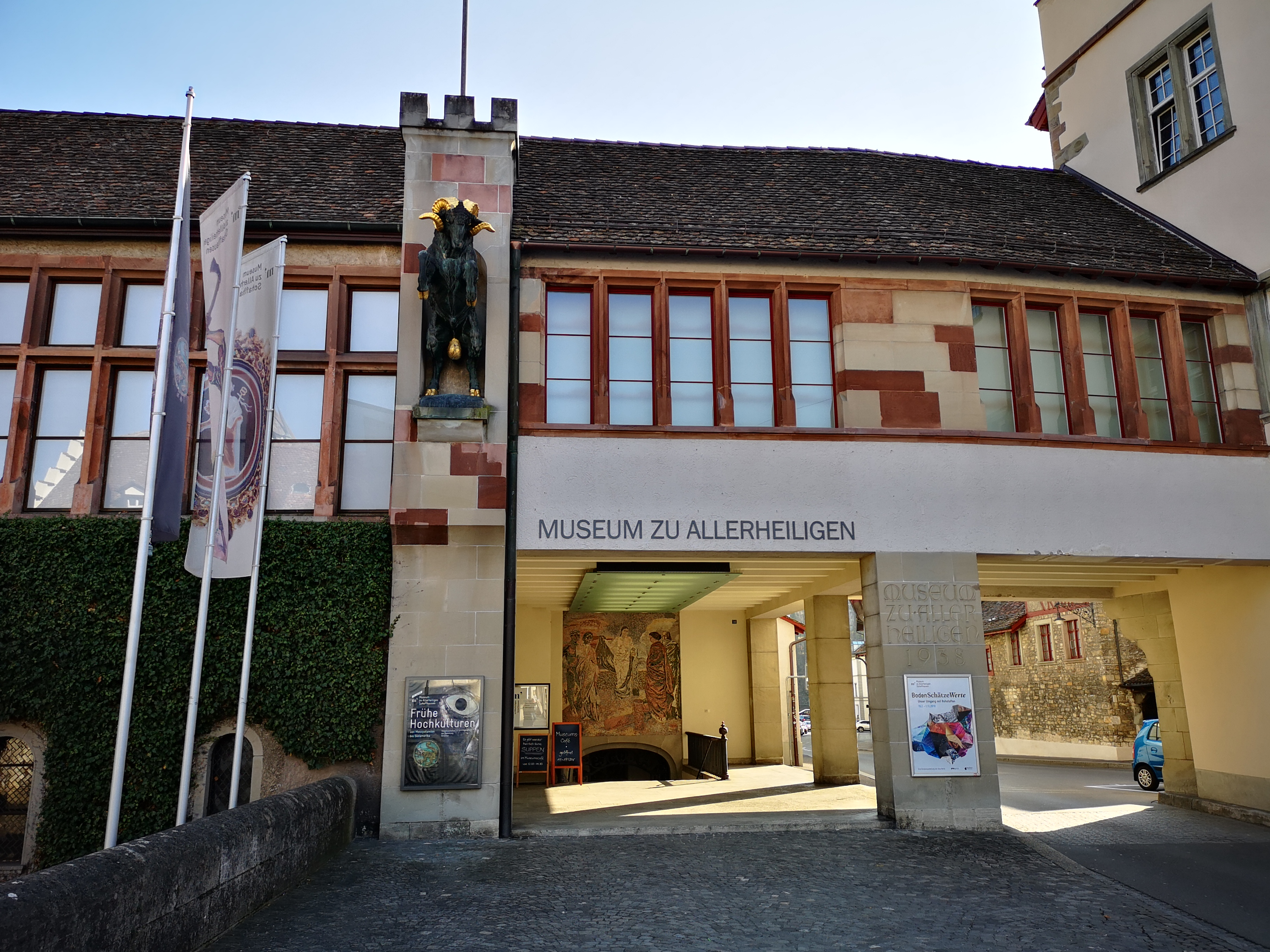 Museum in Schaffhausen